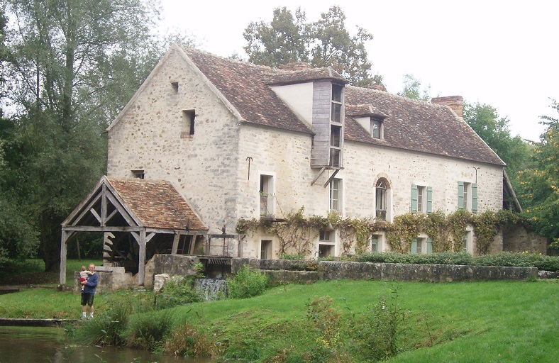 Moulin à aubes composé d'une longère avec une grande fenêtre au niveau du toit, avec sa roue sur son pignon gauche sous un abri en bois, entraînée par le courant de l'eau du bief, dont le débordement emplit un étang en bas à gauche